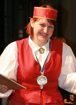 Aruküla kultuuriseltsi tegevjuht Garina Paiste